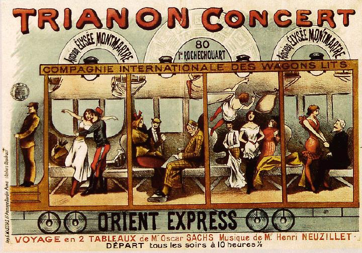 Plakat zum Theaterstück "Orient-Express" aus dem Jahr 1896, von Alfred Choubrac (1853-1902)